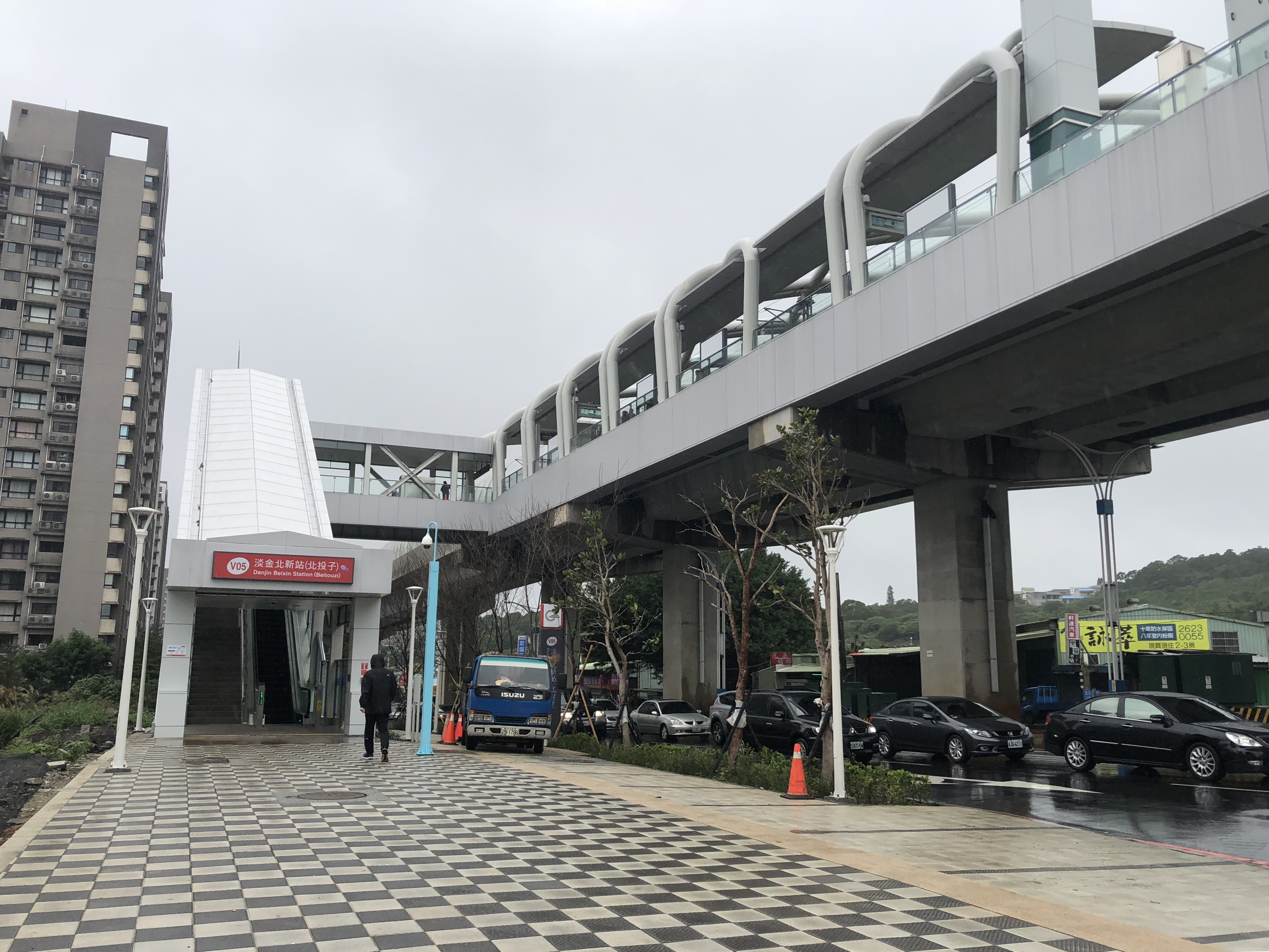 淡金北新站（北投子）